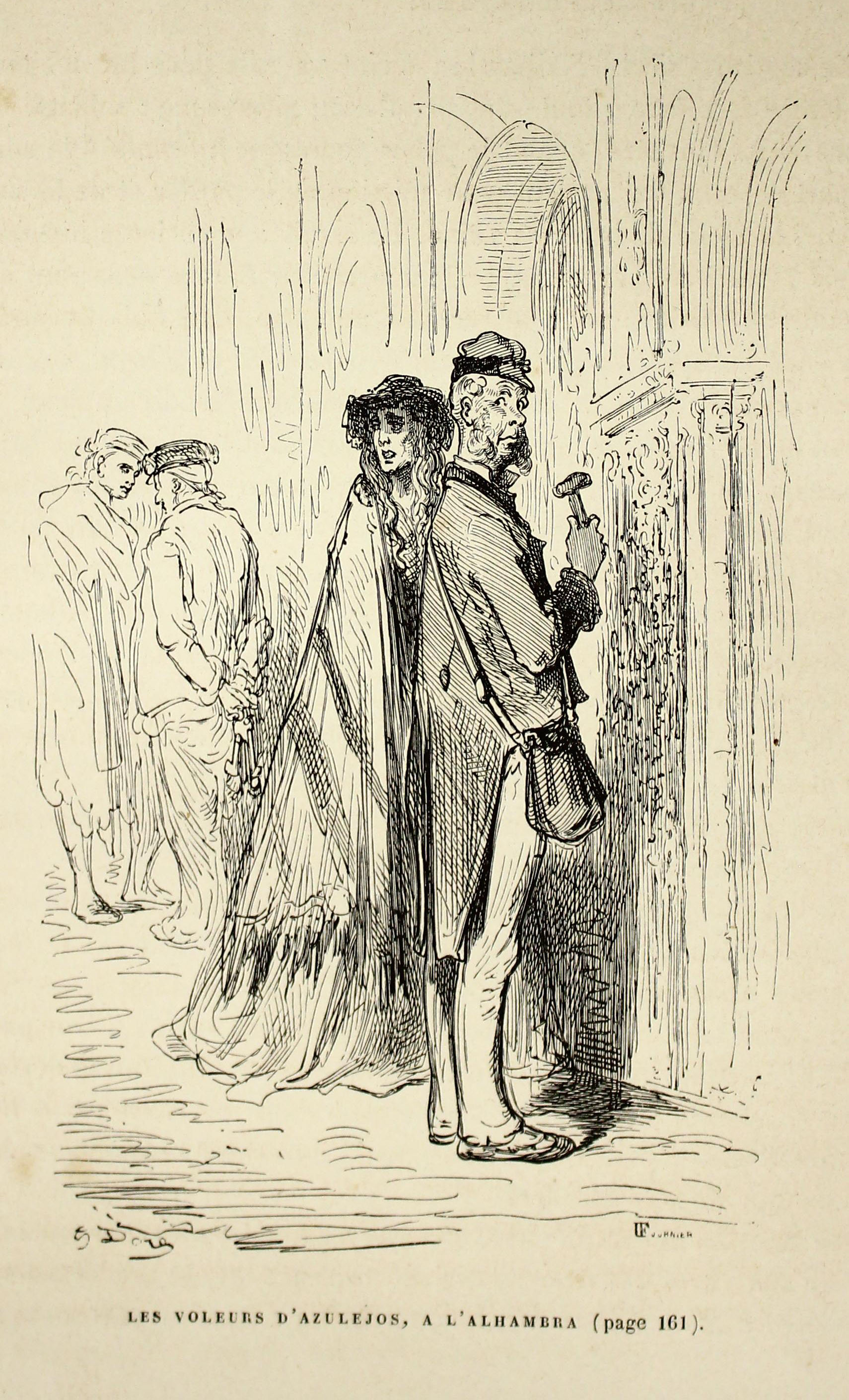 Autor: Davillier, Jean Charles, barón, 1823-1883 Descripción bibliográfica: L'Espagne / par Le Baron CH. Davillier ; ilustrée de 309 gravures dessinées su bois par Gustave Doré. - Paris : Librairie Hachette, 1874. - 799 p. : il. Materia: España- Geografía Materia: España- Usos y costumbres Ilustrador: Doré, Gustave, 1832-1883 Editor: Libreria Hachette Lugar de impresión: Francia, París Localización: Libro completo